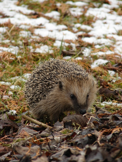 Stacheligel im Winter